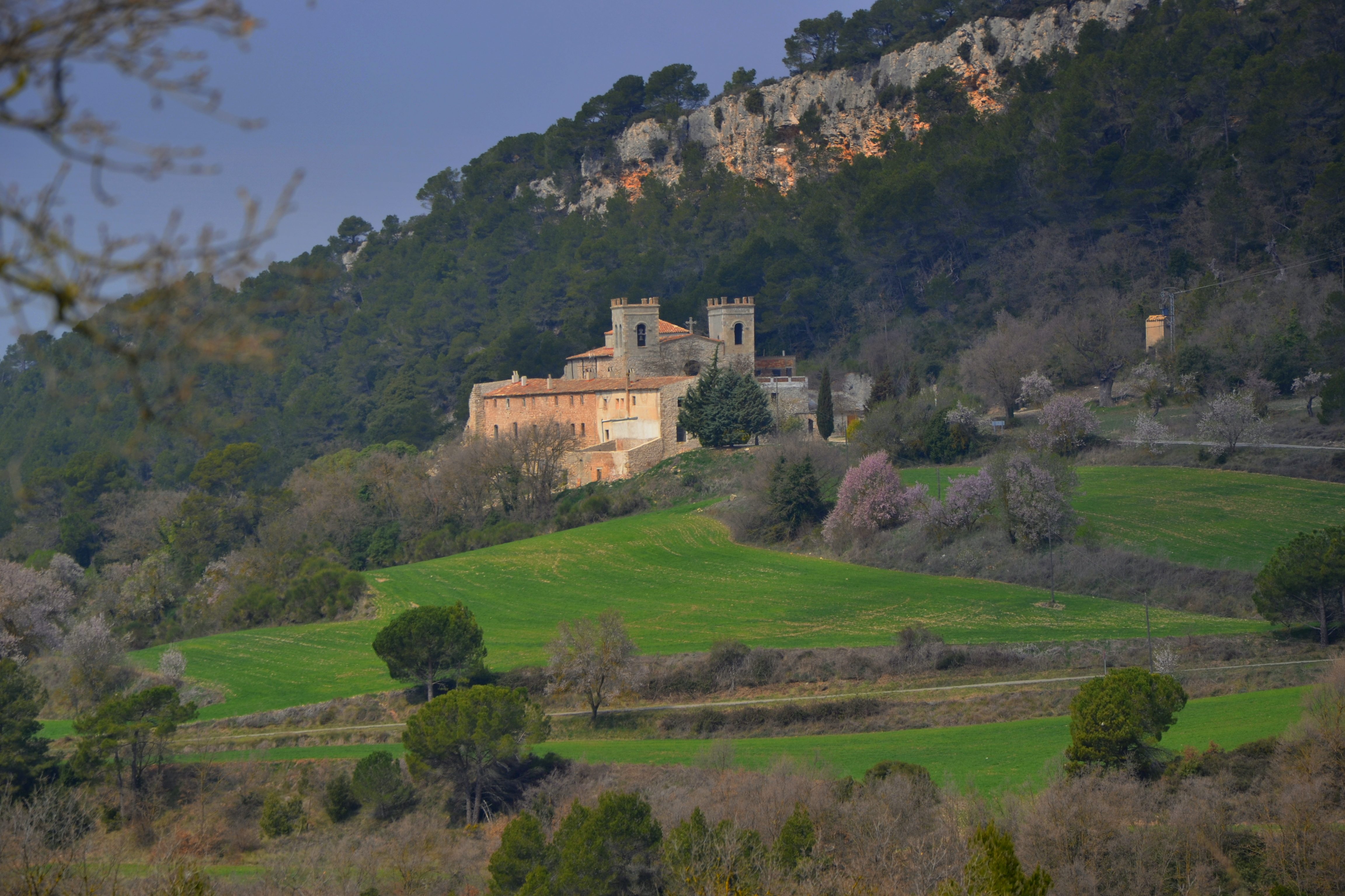 Santuari de Sant Magí de la Brufaganya This is a a photo of a natural area in Catalonia, Spain, with id: ES510271